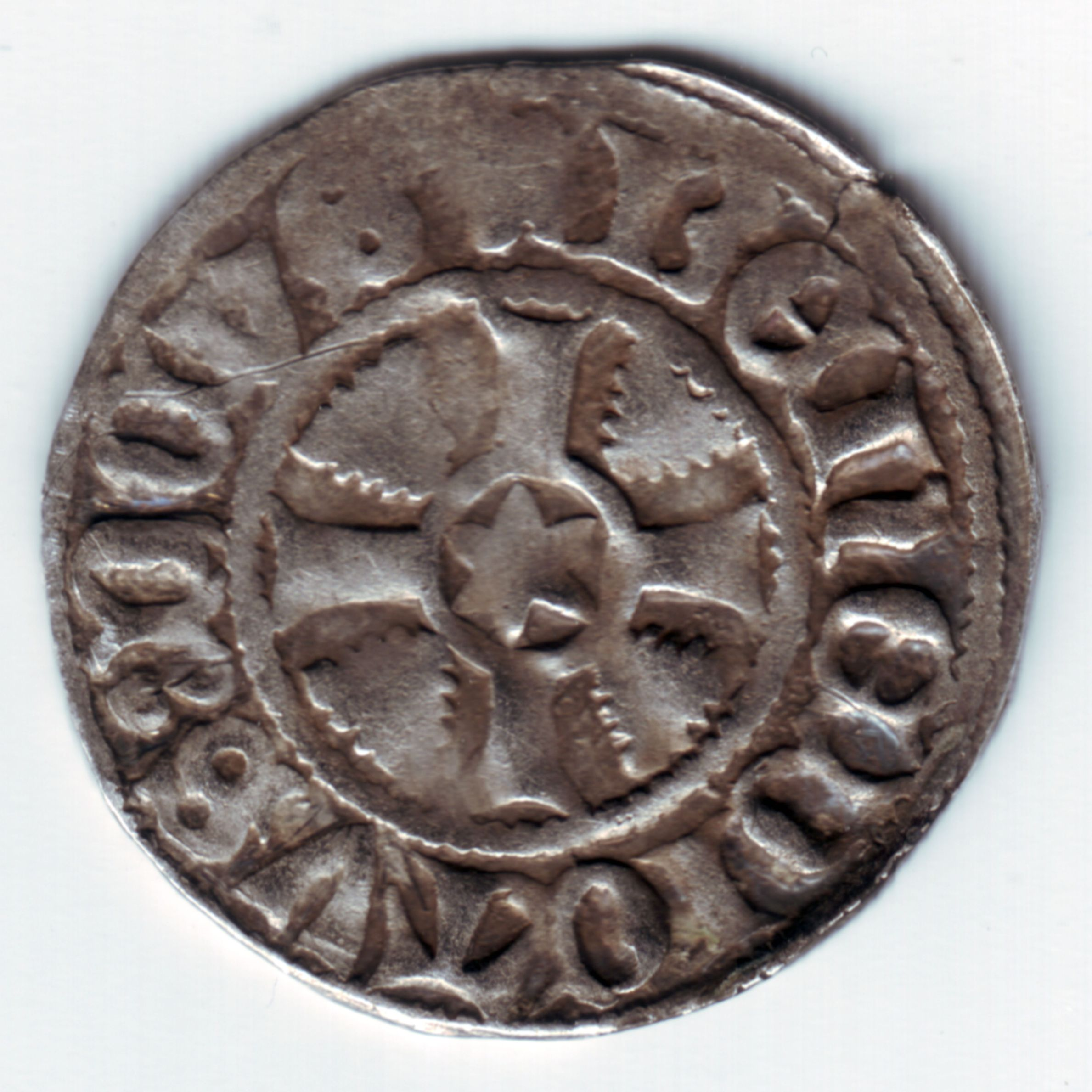 Wittenpfennig geprägt zwischen 1379 und 1387 in Hamburg, Text: BENEDICTUS DEUS, Witte, Witten.